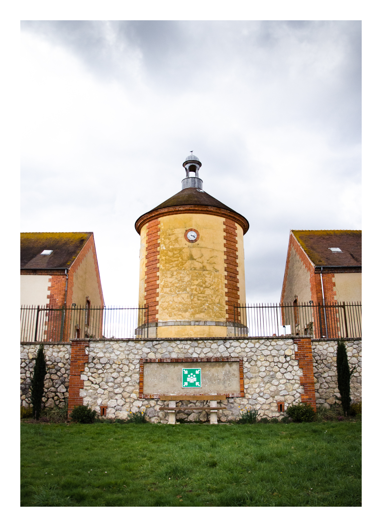 Photographie représentant le pigeonnier de la bergerie nationale de Rambouillet.